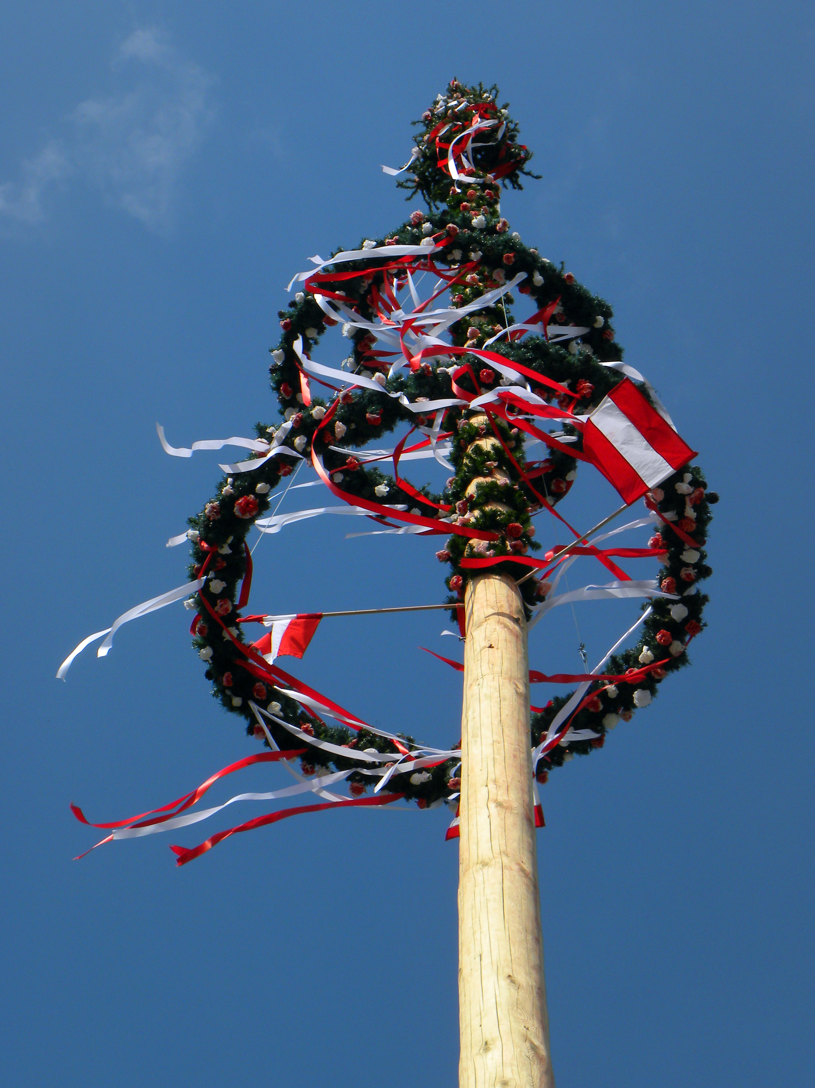 Der Maibaum von St. Magdalena im Jahr 2013. (Der vom Linzer Hauptplatz wurde hingegen, einem alten Brauch entsprechend, gestohlen.)